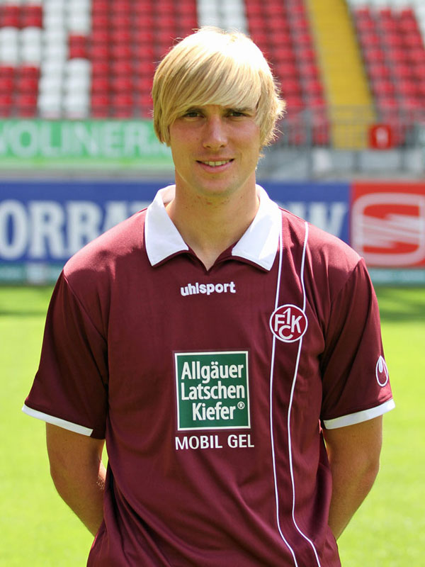 Martin Amedick, Fußballspieler